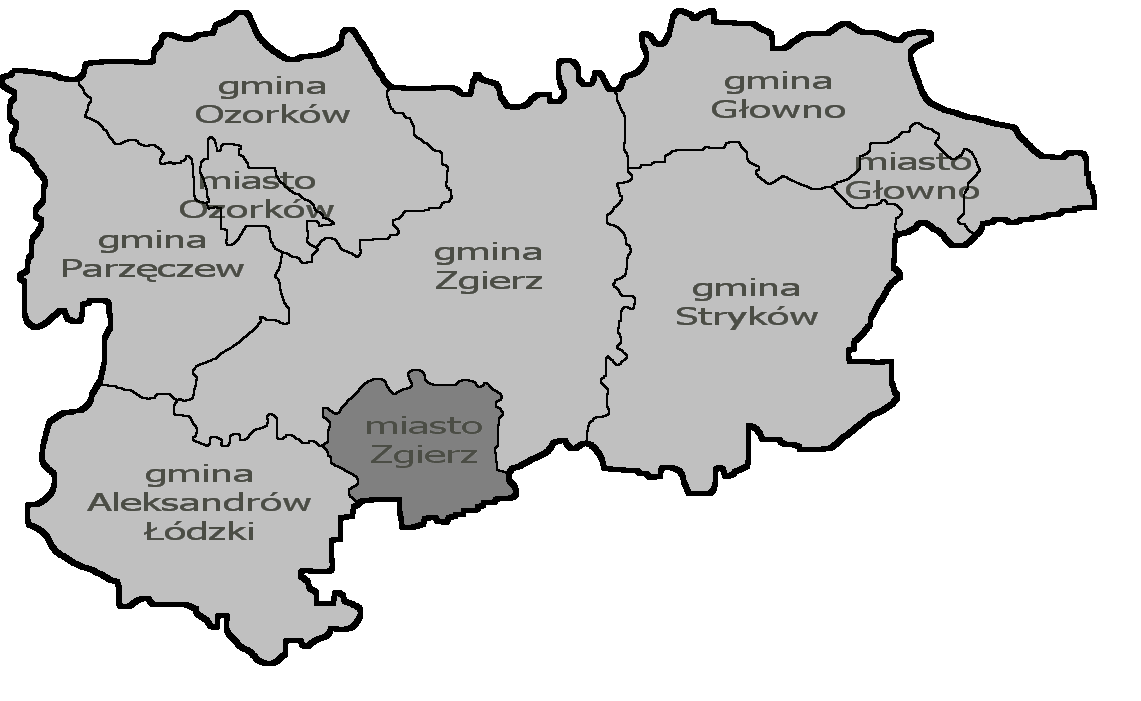 Gmina miejska Zgierz na mapie powiatu zgierskiego